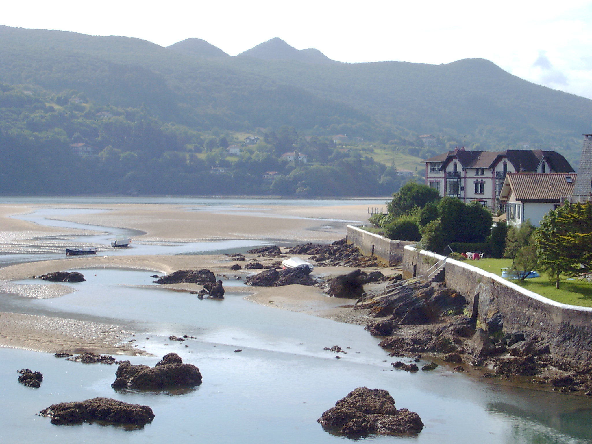 Urdaibai Sukarrietatik